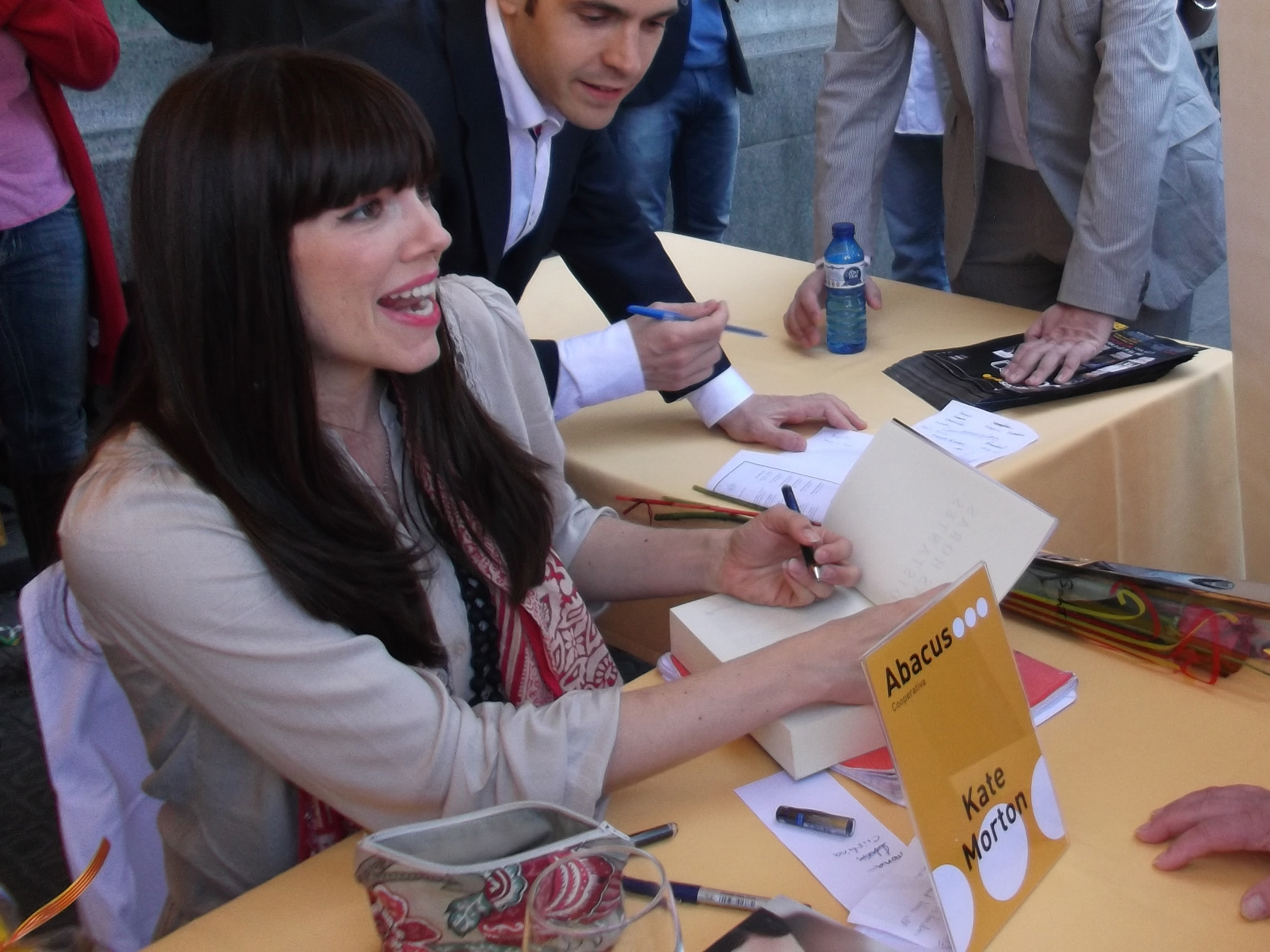 Kate Morton firmando libros el Día de San Jordi, Barcelona (La fotografía está hecha el 23.04.2013)